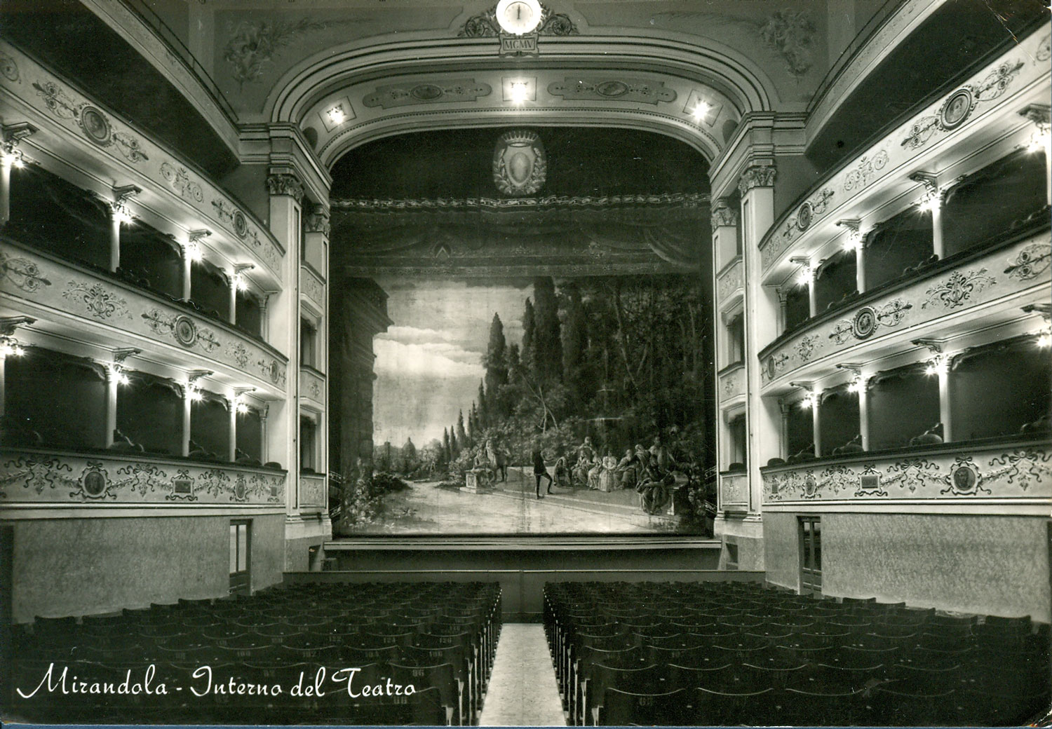 L'interno del Teatro Nuovo di Mirandola in una cartolina degli anni 1950